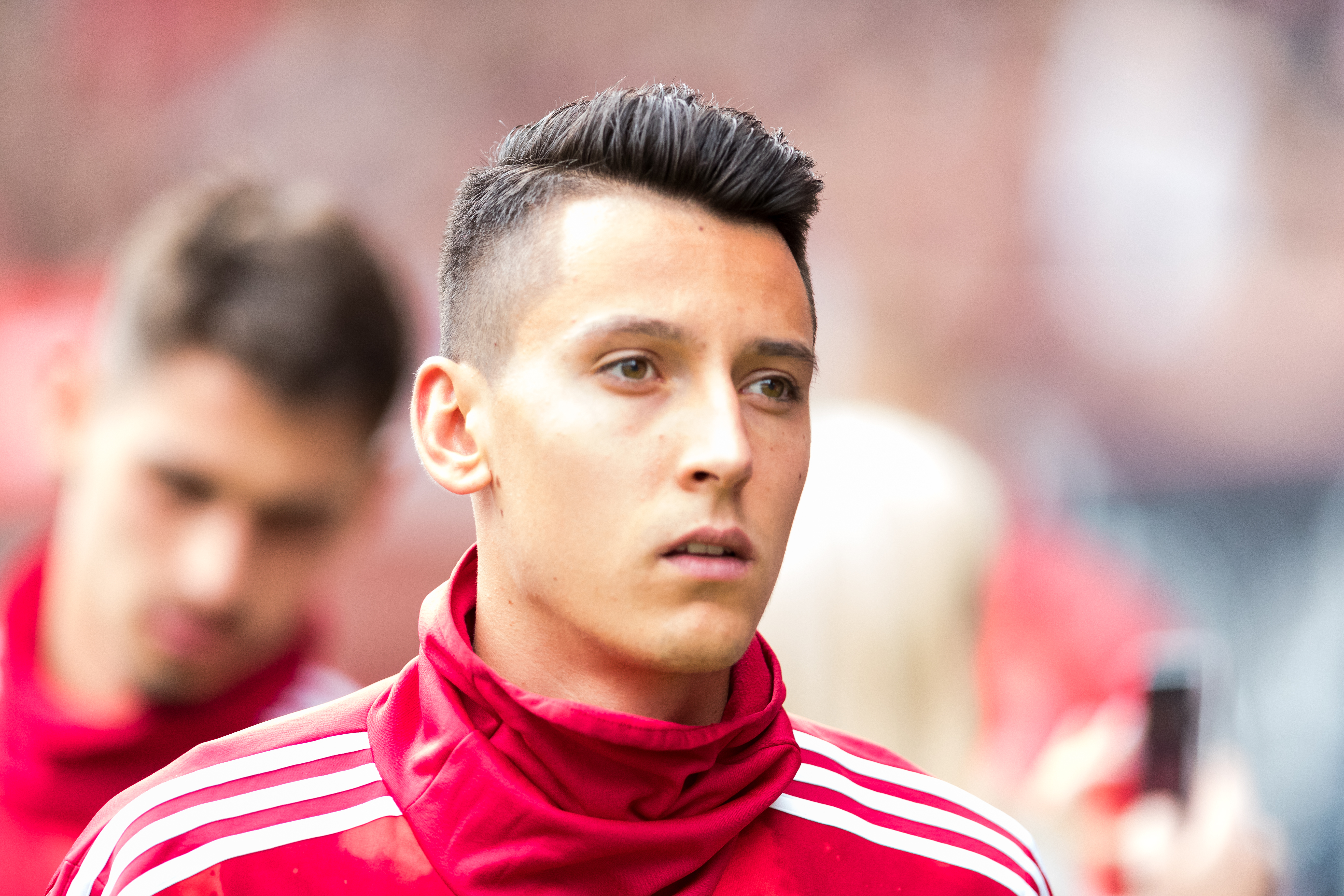 during 1.FC Kaiserslautern vs FC Bayern München at Fritz-Walter-Stadion, Kaiserslautern, Rheinland-Pfalz, Germany on 2019-05-27, Photo: Sven Mandel